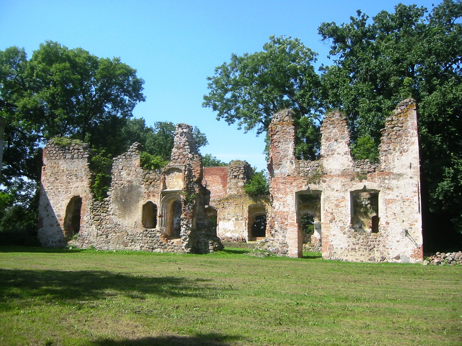 Die beiden Herrenhäuser Ulrichsbau und Johannisbau bilden gemeinsam mit einem Landschaftspark das "Schloss Putzar" im gleichnamigen Ortsteil der Gemeinde Boldekow, Landkreis Vorpommern-Greifswald.